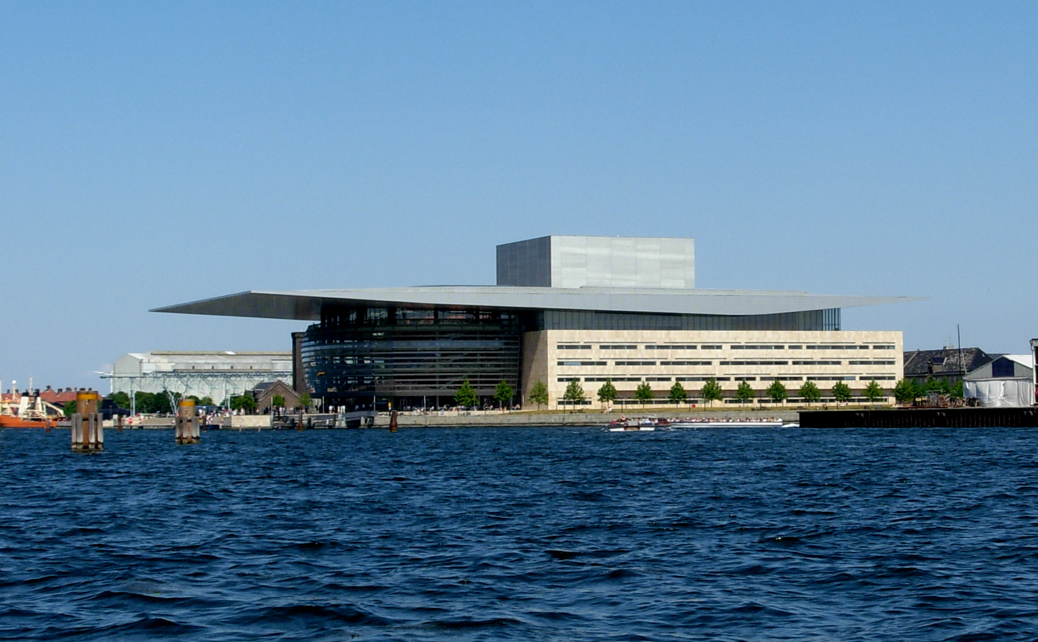 Kopenhagen Opera House